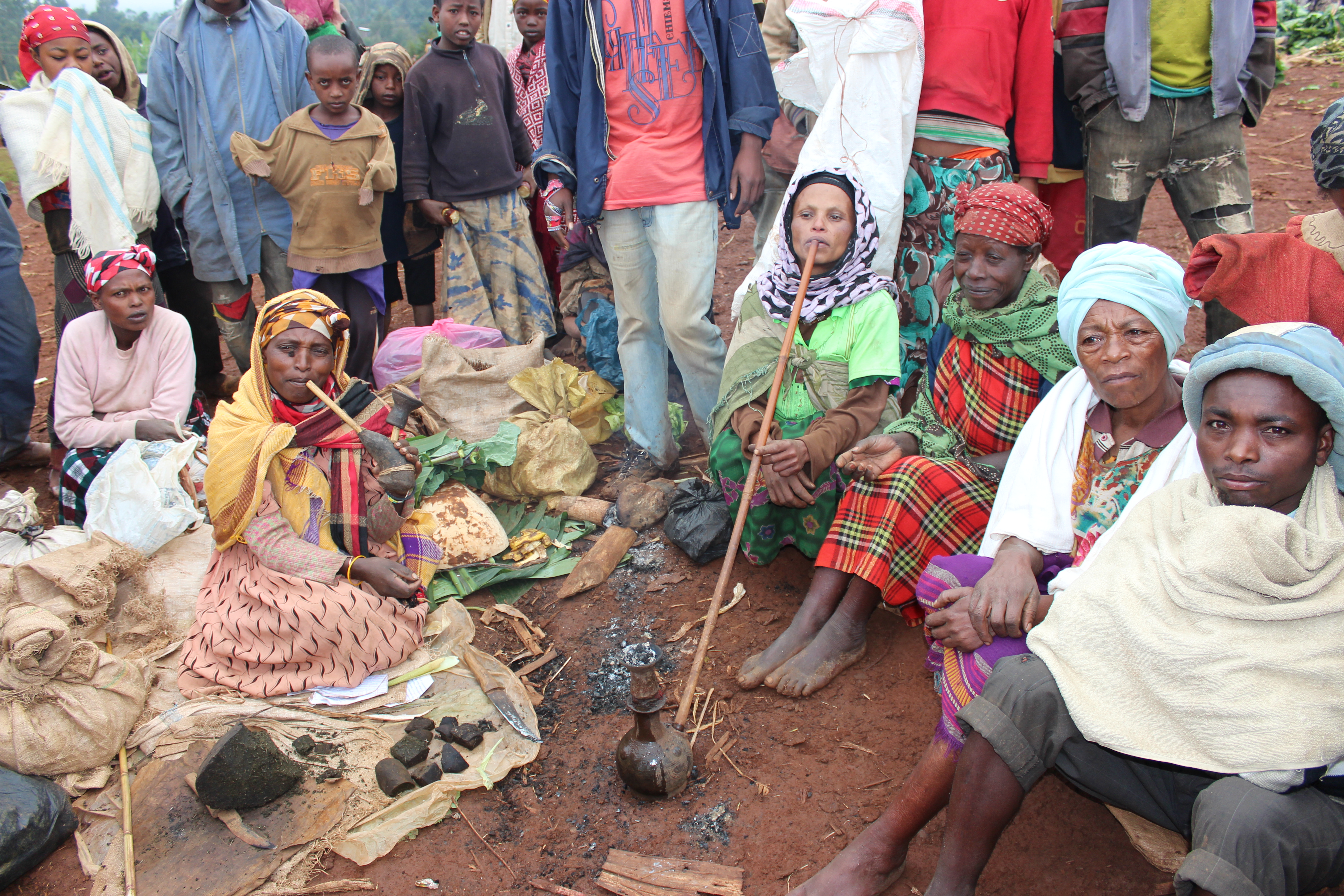 Chencha se situe en pays Dorzé dans l'état "Région des nations, nationalités et peuples du Sud". Il se trouve à 37 km au nord d'Arba Minch, à une altitude de 2 737 m.